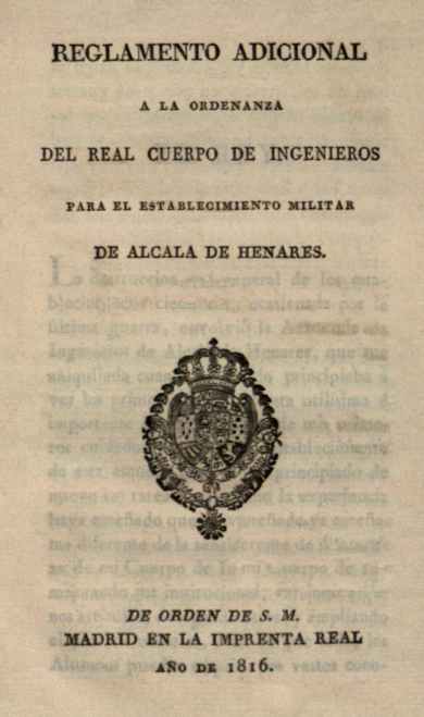 Portada del Reglamento del Real Cuerpo de Ingenieros en Alcalá de Henares (Madrid - España). Publicado en Madrid, en 1816.